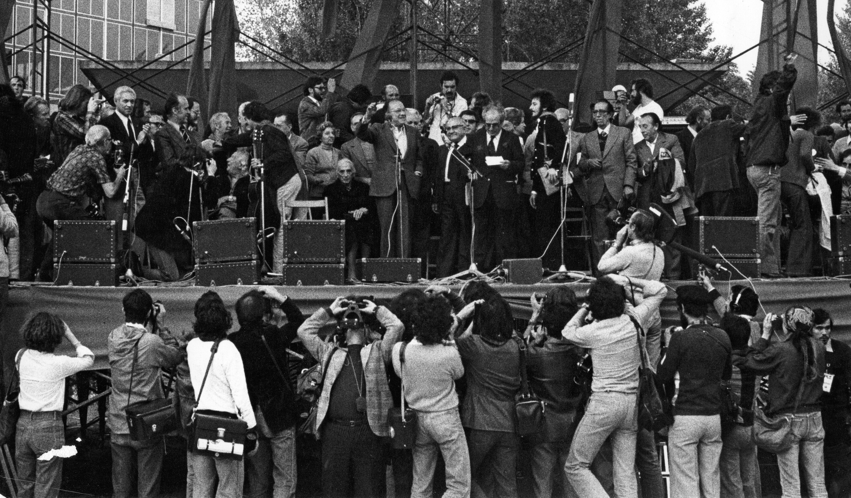 1ª Fiesta del PCE en la Casa de Campo. Día de clausura